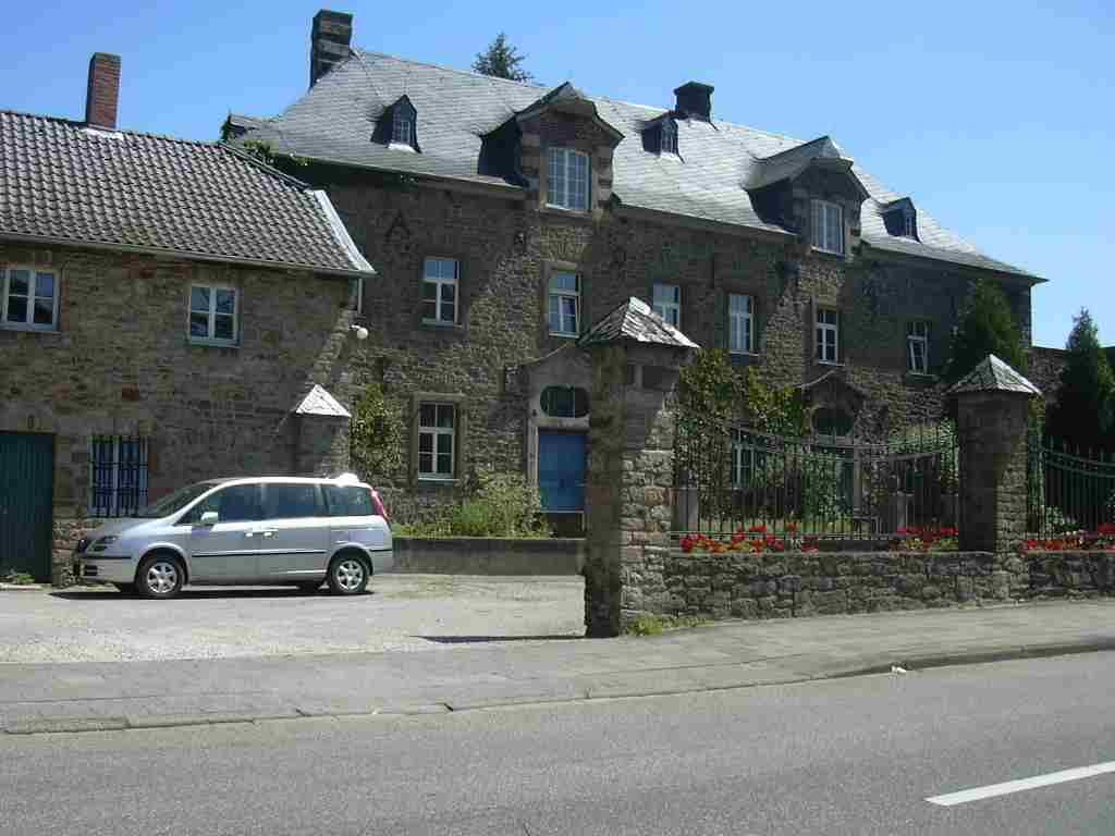 Schneidhausen bei Kreuzau, Firma Hoesch own work papa1234 2006-07-14